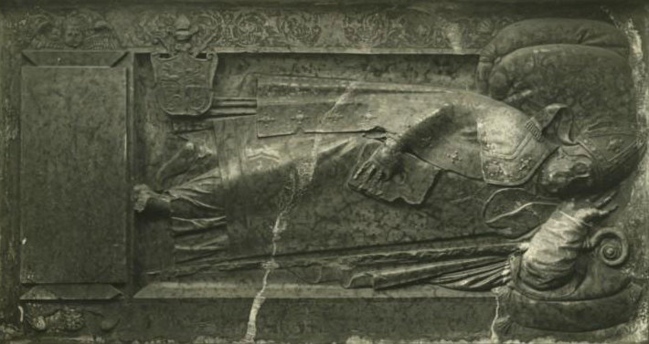 Беларуская (тарашкевіца): Надмагільле Паўла Гальшанскага